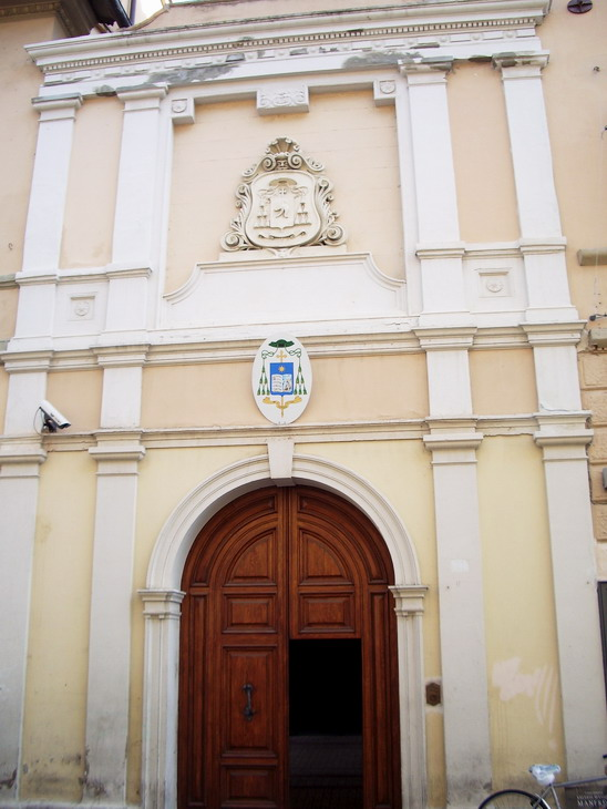 Facciata del Palazzo Vescovile di Grosseto